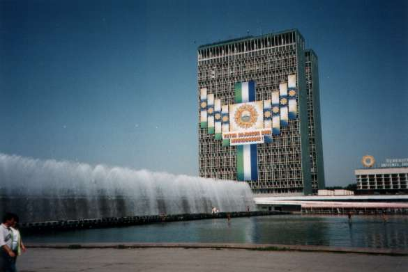 Central Tashkent, Uzbekistan